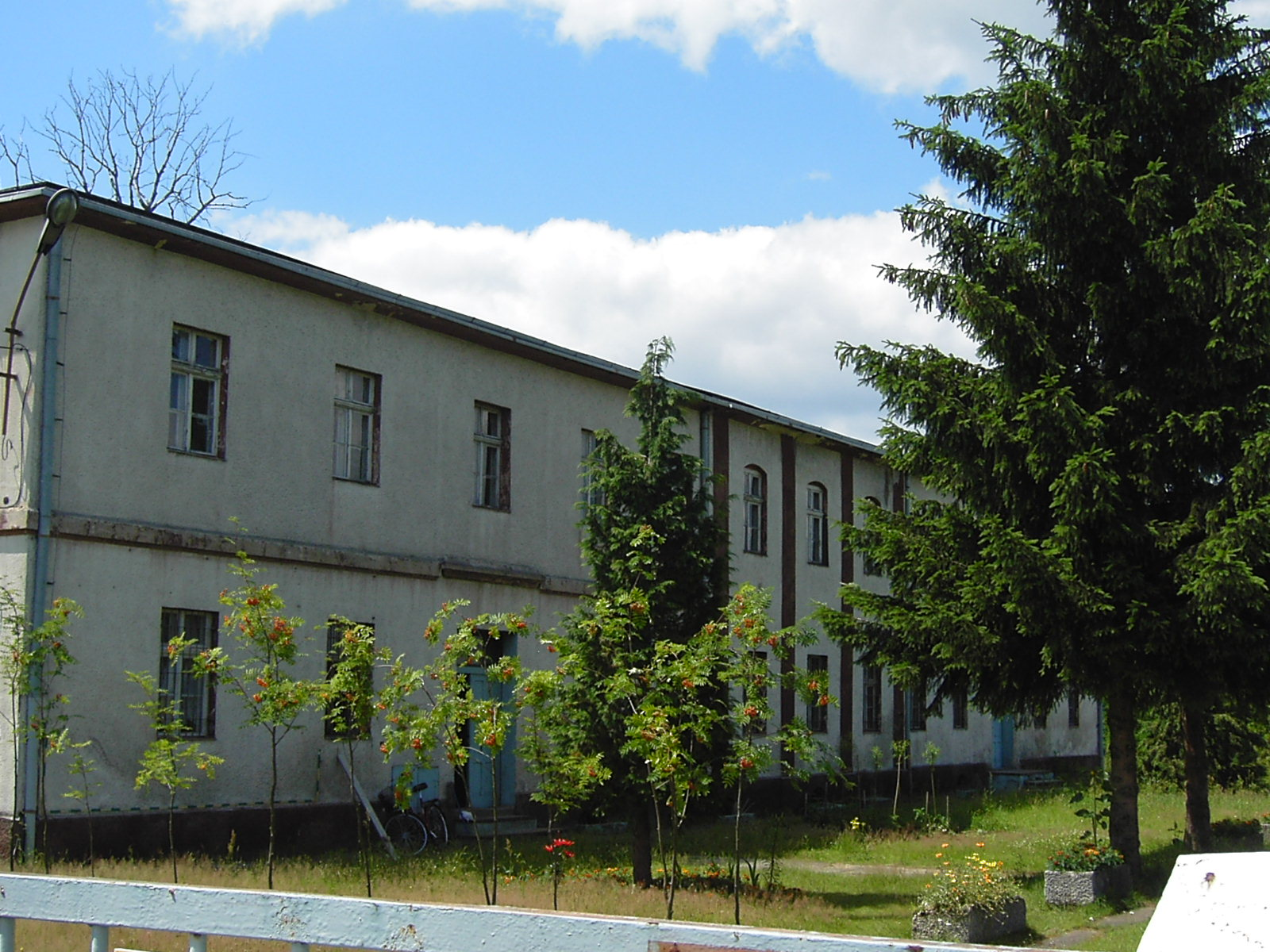 Była strażnica WOP w Żytowaniu